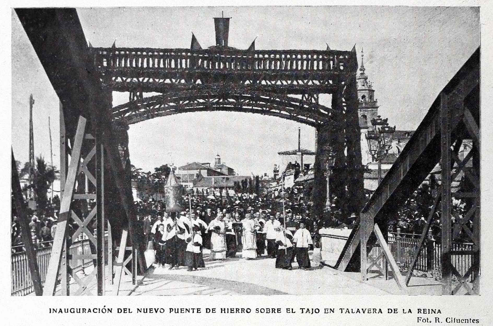 Inauguración del nuevo puente de hierro sobre el Tajo en Talavera de la Reina.